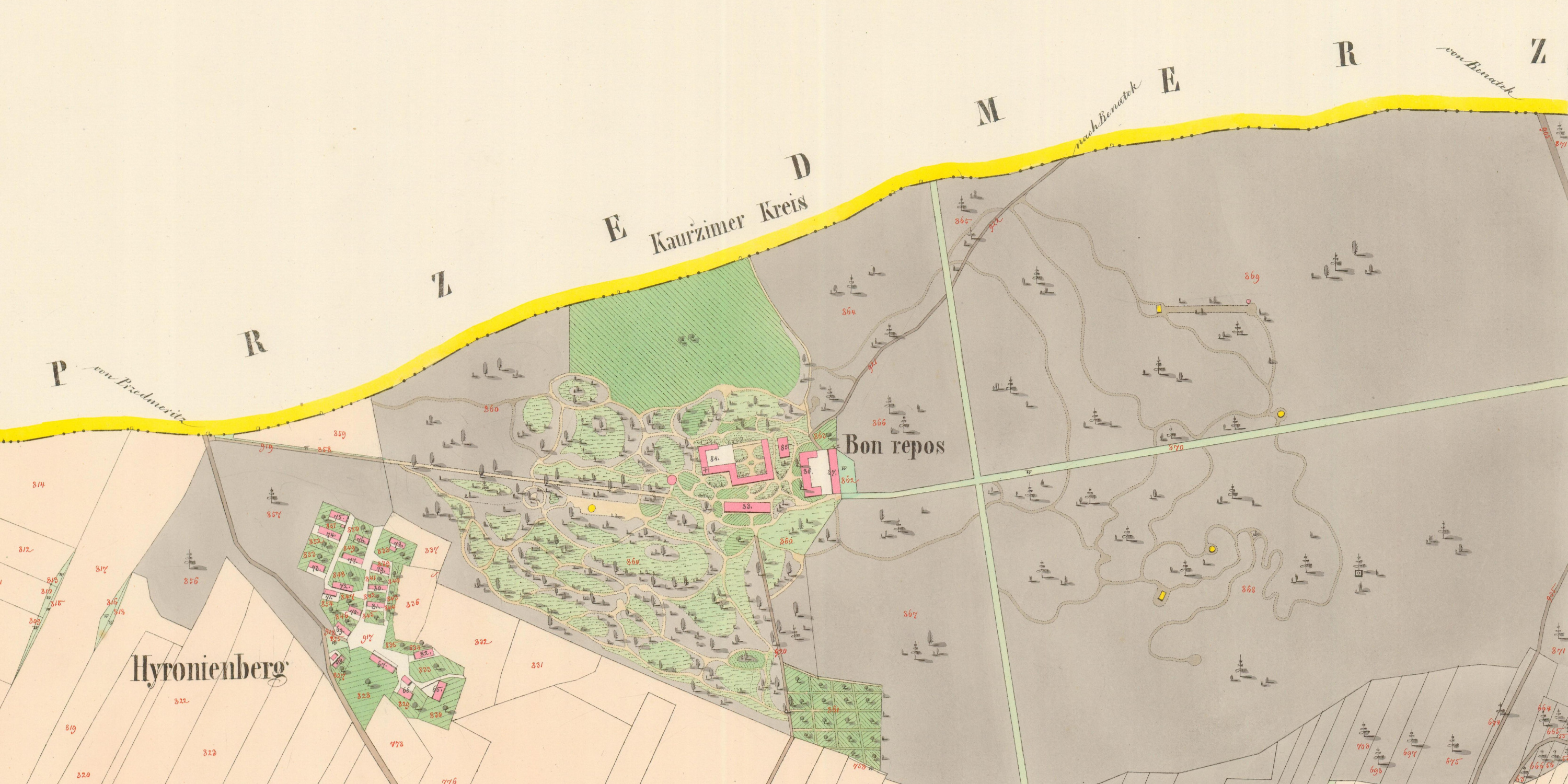 Stará Lysá na císařských otiscích map Stabilního katastru z roku 1842. Obec Čihadla a zámeček Bon Repos s parkem a oborou.